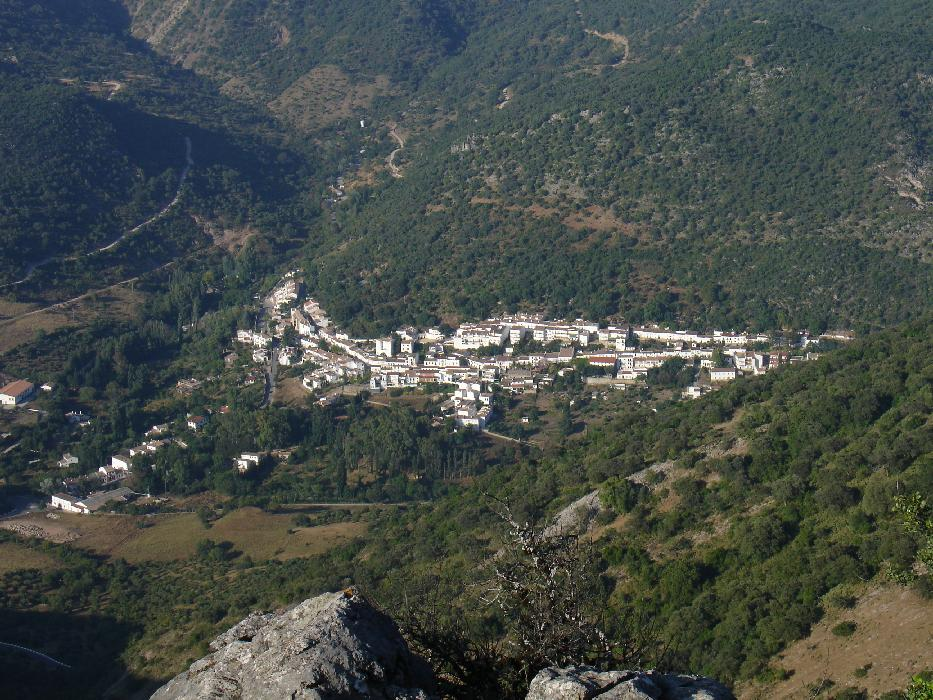 Vista de Benamahoma